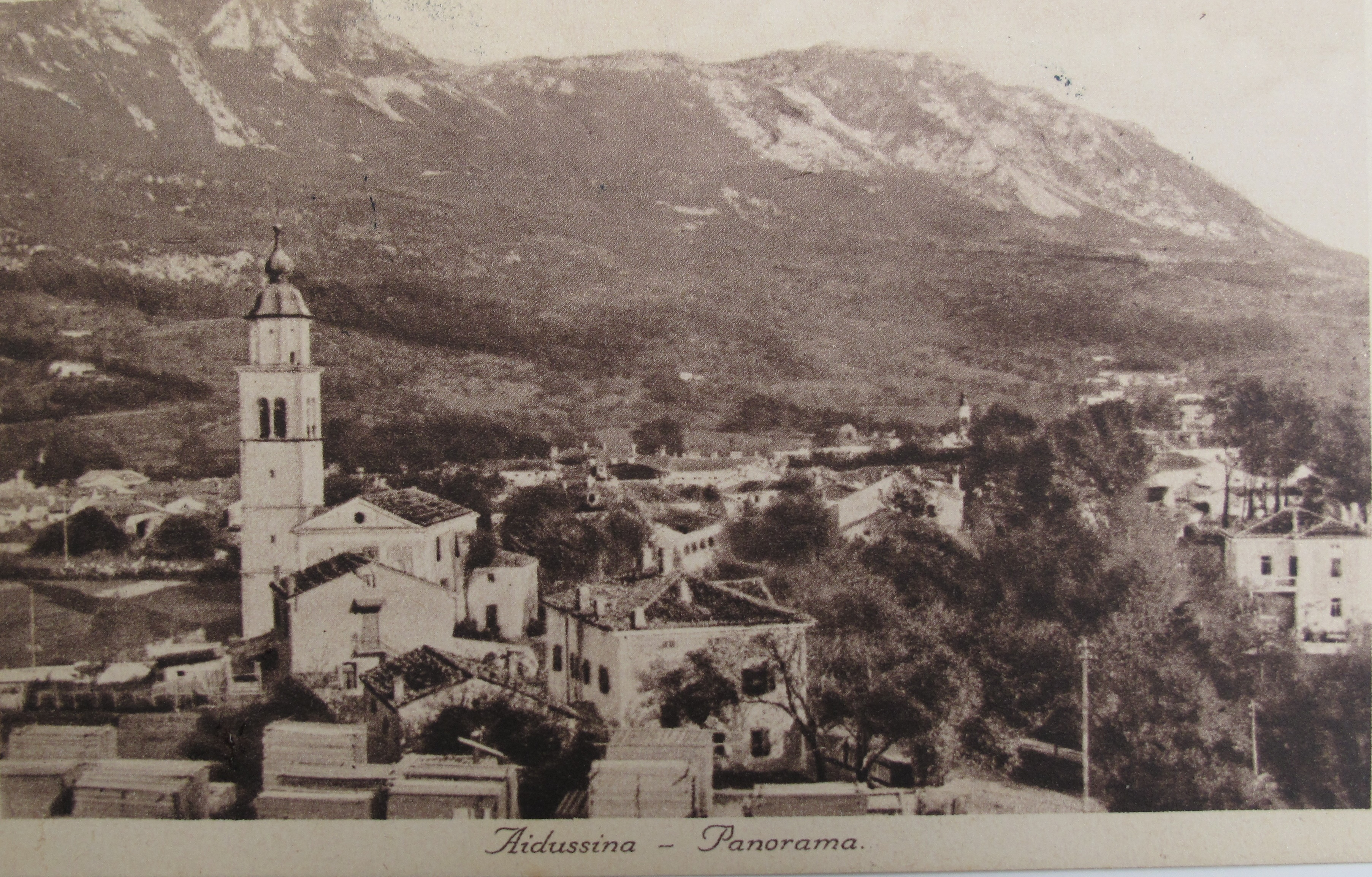 Ajdovščina kar precej pred WW2.